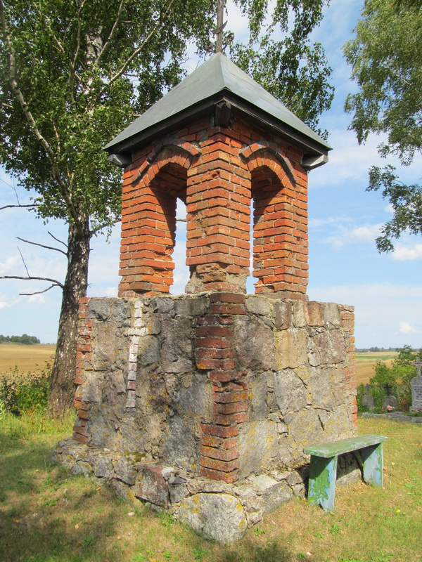 Новая. Капліца на могілках